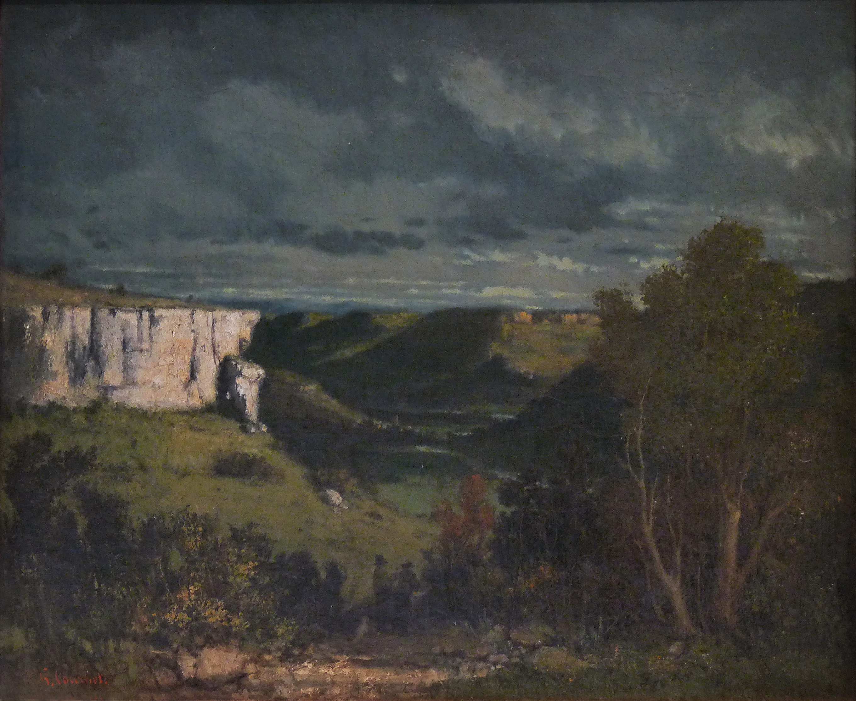 Gustave Courbet, La Vallée de la Loue par ciel d'orage, huile sur toile, Musée des beaux-arts de Strasbourg